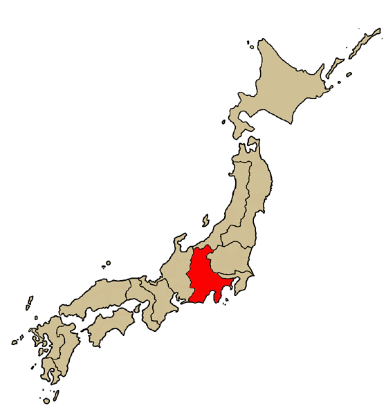 Mappa della diocesi cattolica di Yokohama, in Giappone. Lavoro personale.